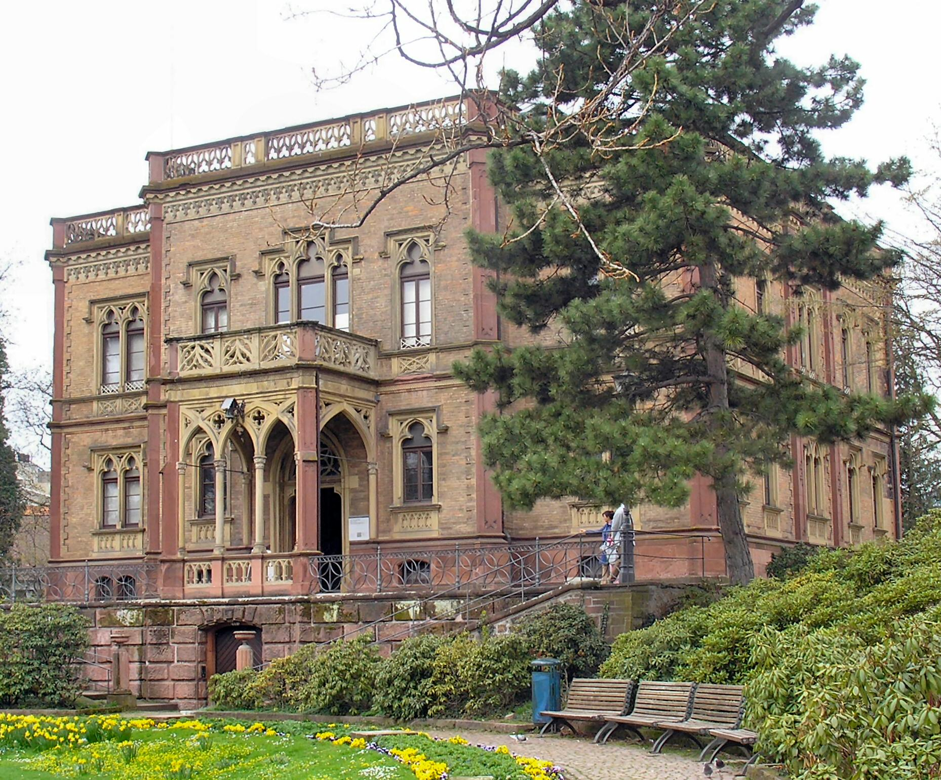 Colombischlösschen von der Seite (Freiburg im Breisgau Germany)